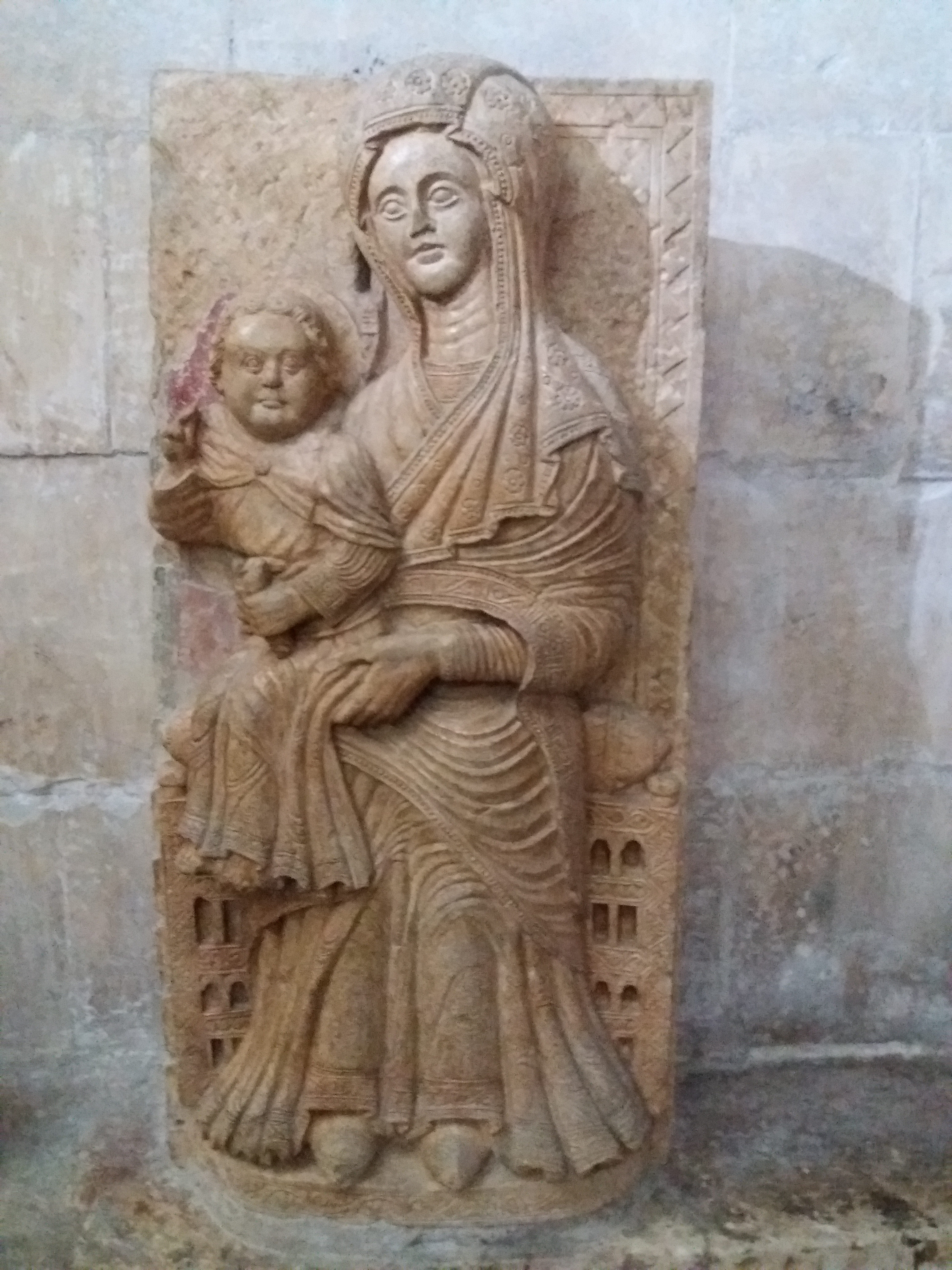 Sulmona: Cattedrale di San Panfilo